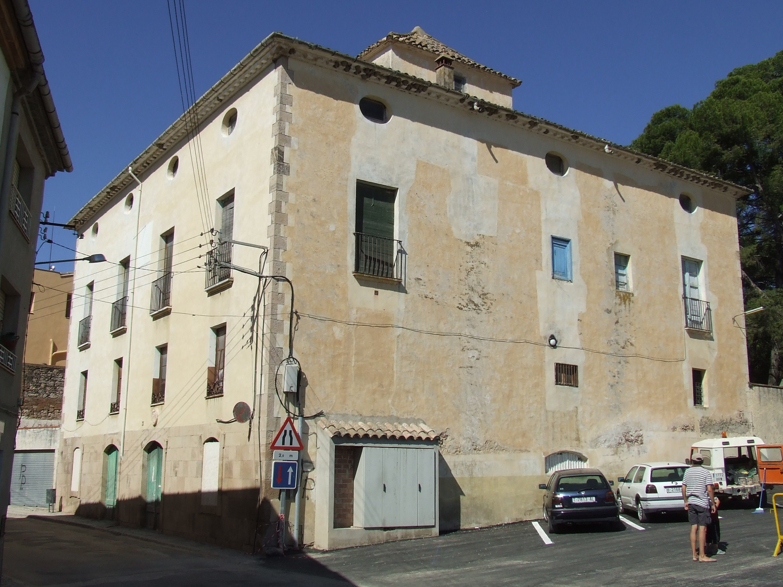 Casa senyorial de Marçà, situada al Carrer de Dalt.